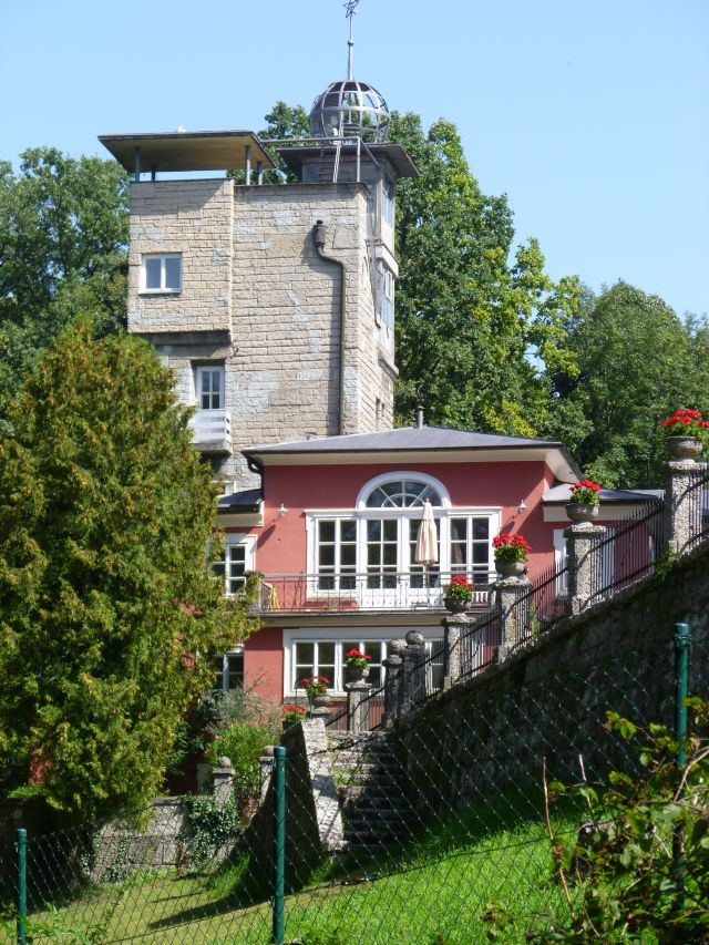 Grasmayr-Villa auf dem Mönchsberg in der Stadt Salzburg (Anmerkung: falsche Datumsangabe; das Bild kann nicht im Winter aufgenommen worden sein)